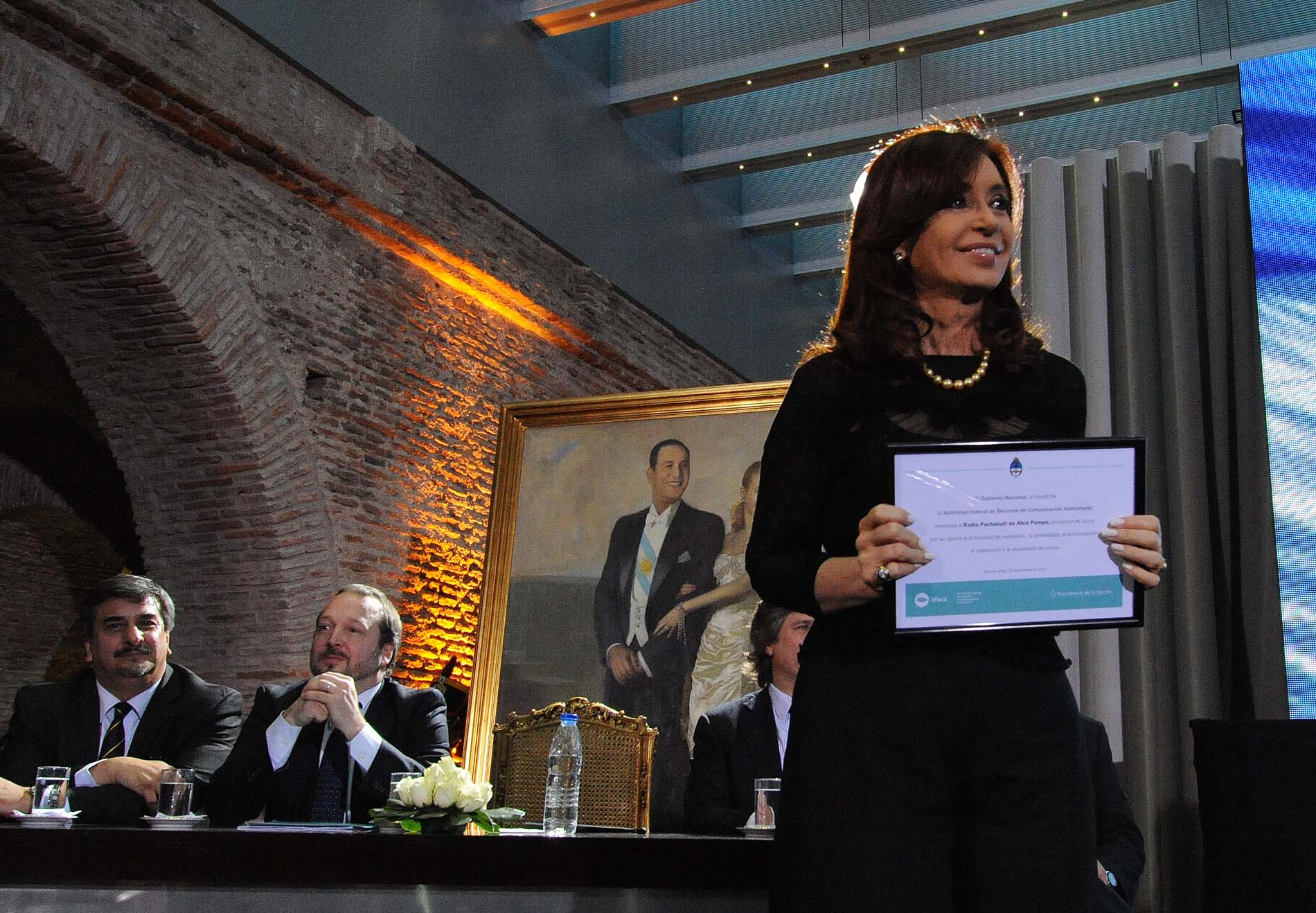 Acto por el tercer aniversario de la Ley de Servicios de Comunicación Audiovisual.